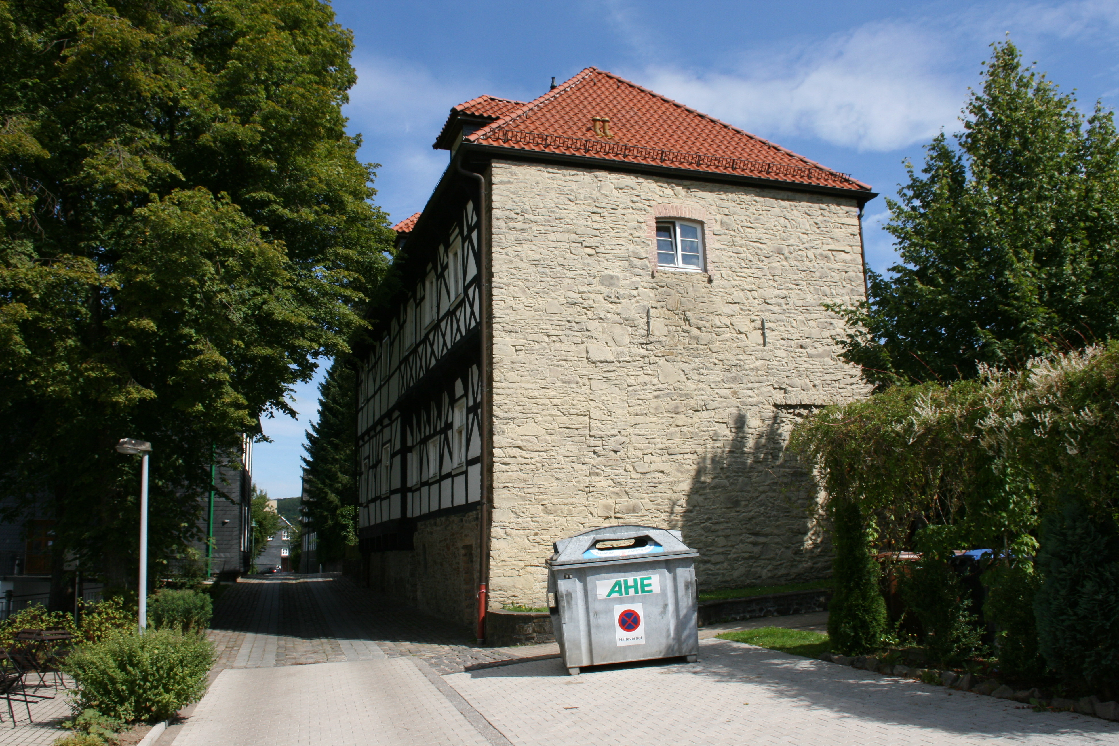 Altes Äbtissinnenhaus, Im Stift 9 in Gevelsberg